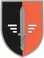 Эмблема 52-й эскадрилью Люфтваффе